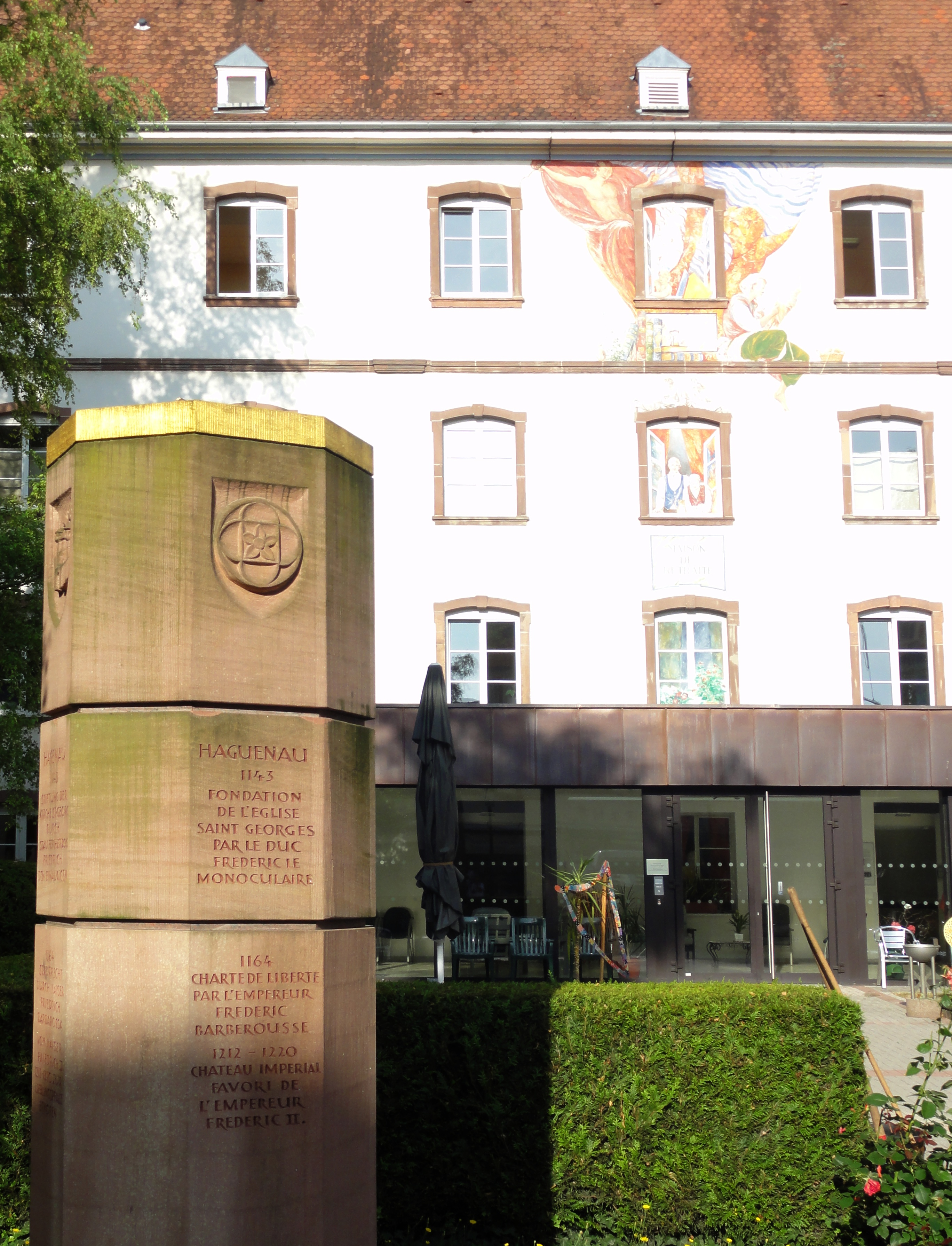 Alsace, Bas-Rhin, Haguenau, Maison de retraite, ancien emplacement du Château "Pfalz", 1 rue du Château. .